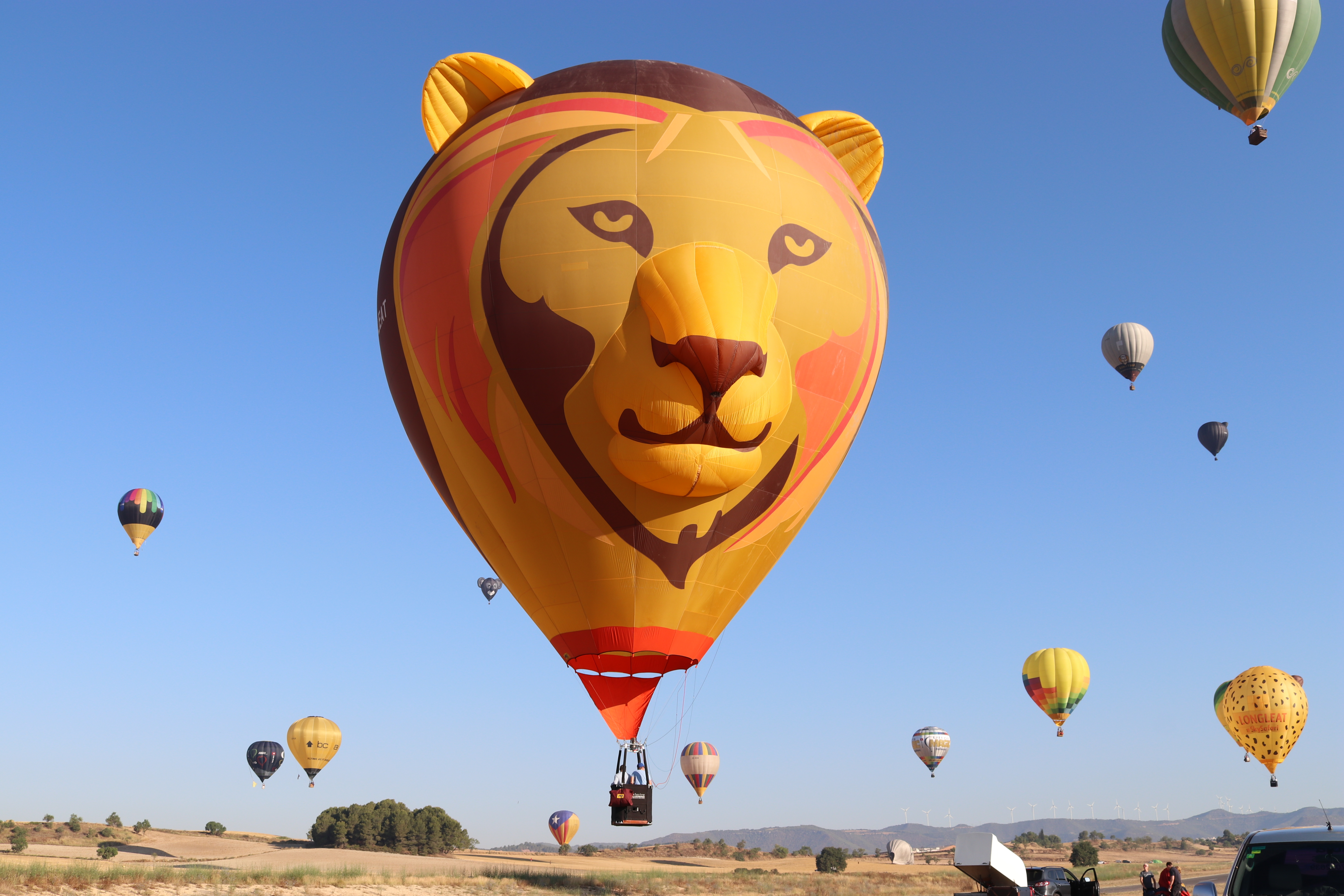 Aterratge vol de premsa, European Balloon Festival 2019